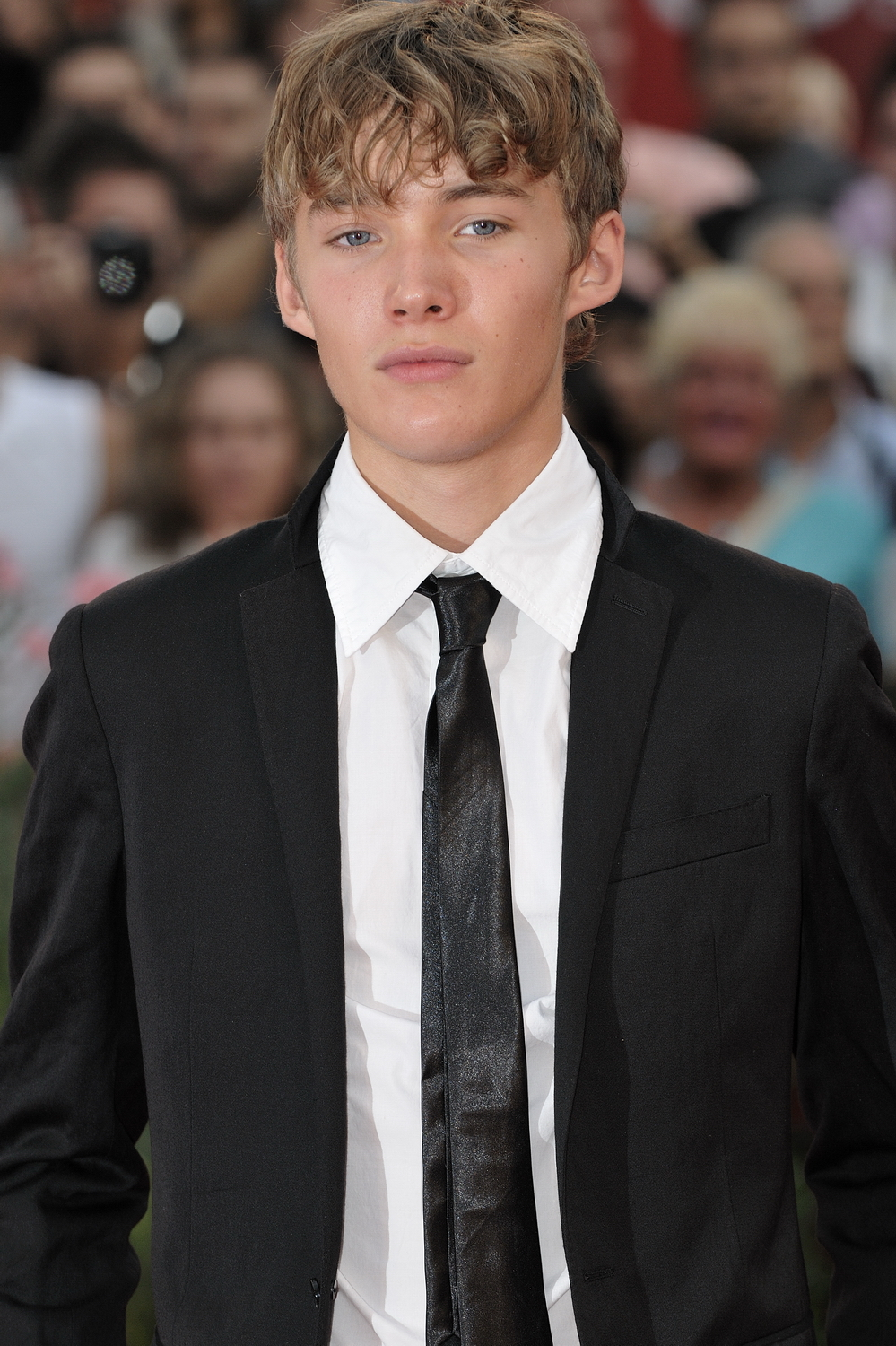 Toby Regbo, 66ème Festival du Cinéma de Venise (Mostra), 11ème jour (12/09/2009). Tapis rouge pour la soirée de cloture du Festival de Venise 2009